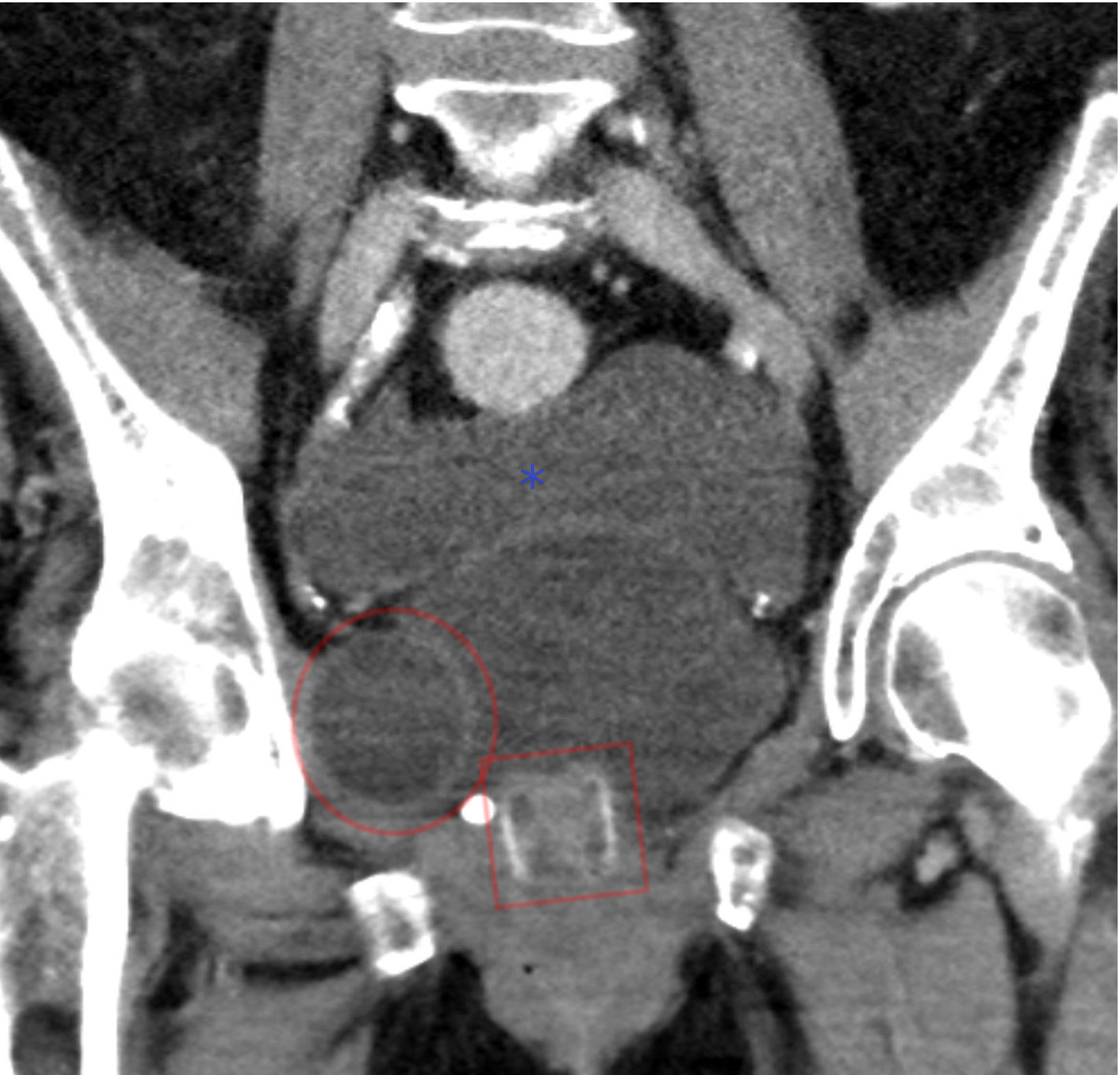 Sphinkterimplantat / Sphinkterprothese der Urethra bei einer Frau. Darstellung in der Computertomographie (coronar): Rechts neben der Blase mit Kreis markiert (links im Bild) das intrapelvine Reservoir und unter der Blase mit Rechteck markiert die Manschette um die Urethra. Die Verbindungsschläuche zur Pumpe sind in dieser Schicht nicht zu sehen. Bei der Frau war zusätzlich noch reichlich freie intraabdominelle Flüssigkeit oberhalb der Blase nachweisbar (blauer Stern).